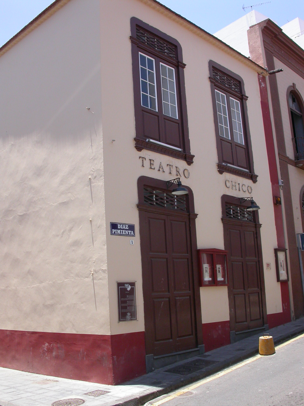 Fachada del Teatro Chico en Santa Cruz de La Palma